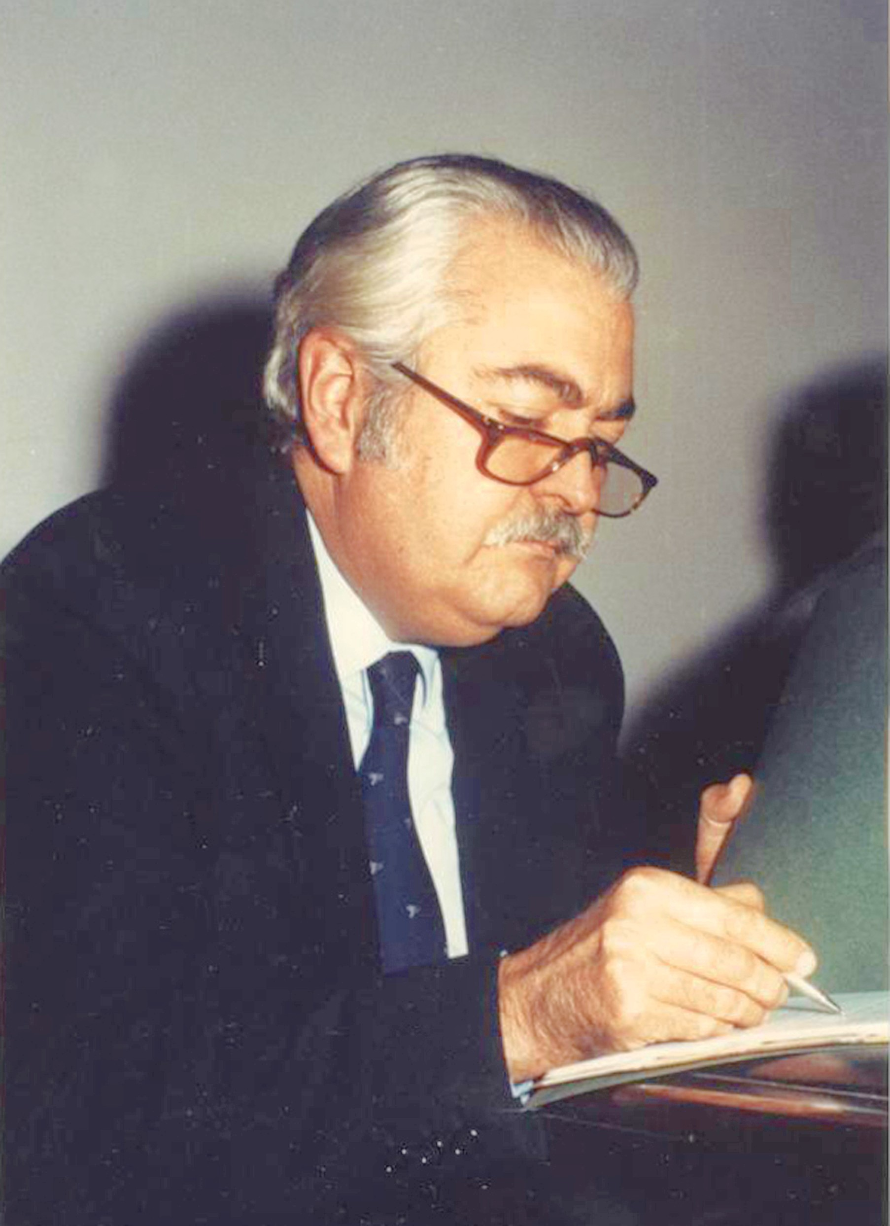 En una de sus largas jornadas de estudio